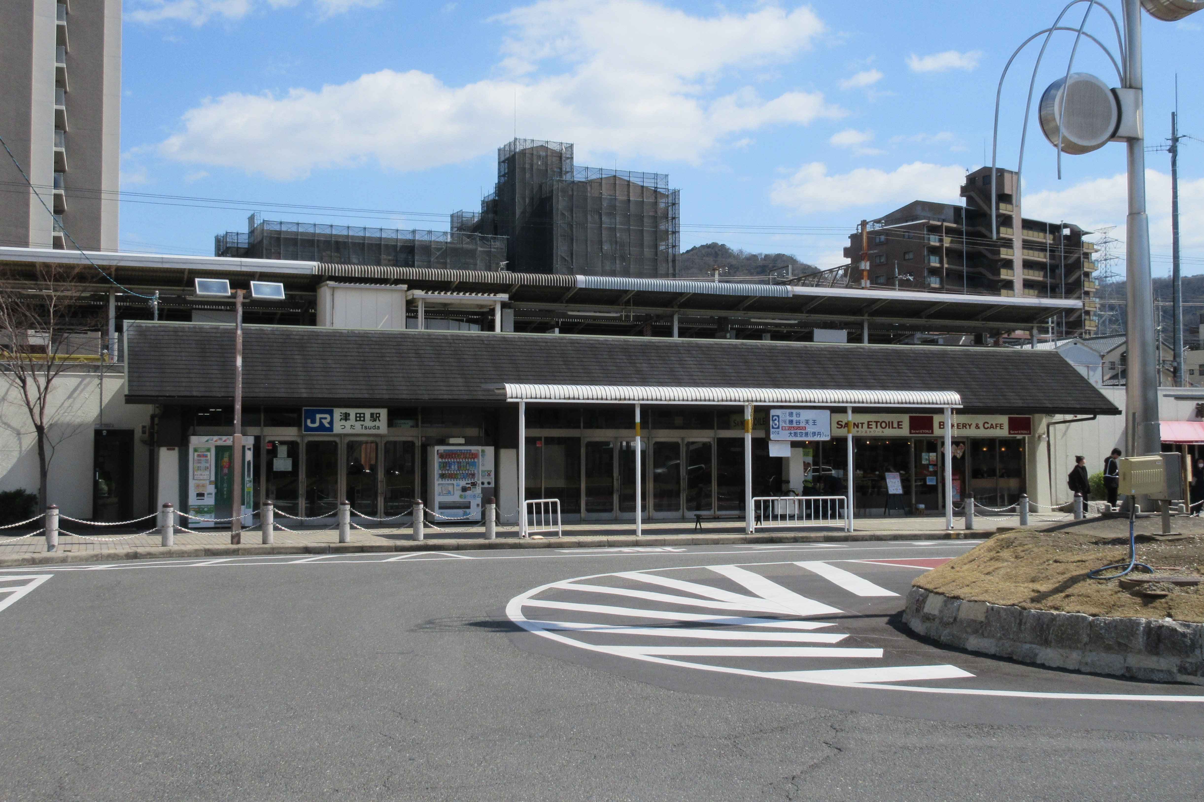 JR津田駅